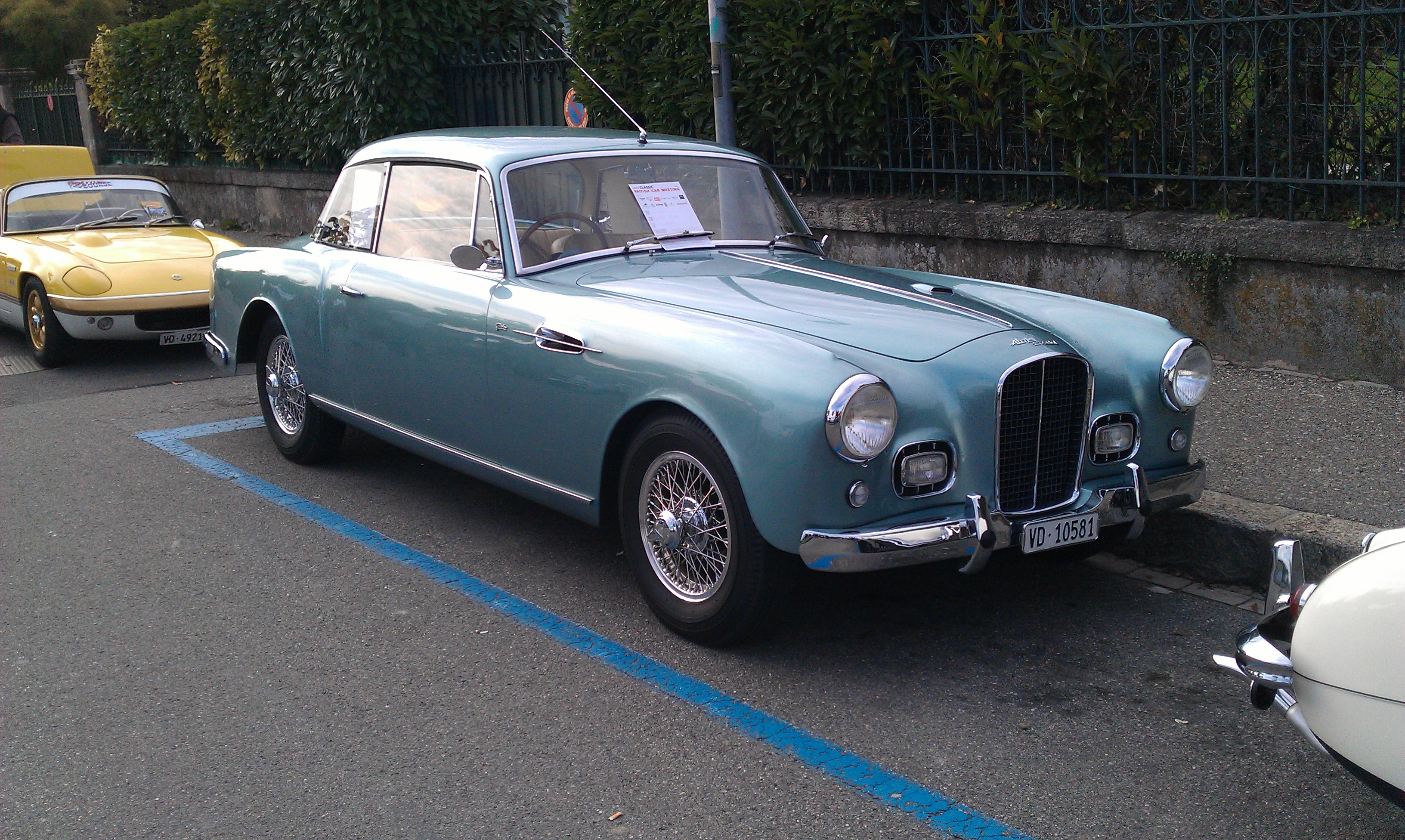 Alvis «Graber» TC 108 G Coupé Special de 1957. 15 modèles ont été construits chez le carrossier Graber à Wichtrach, dans le canton de Berne, en Suisse, à partir de châssis et moteurs importés de chez Alvis, au Royaume-Uni. Les voitures étaient construites selon les désirs des clients, donc aucune n'est strictement identique aux autres. Ainsi, le relief au sommet des ailes avant est propre à ce modèle.